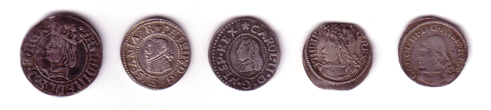 Croat (moneda catalana) anversos. El croat era una moneda catalana d'argent creada el 1285 pel rei Pere II. Va ser coneguda com croat barceloní i, també, com a xamberg. A l'anvers figurava l'efígie del comte de Barcelona, i al revers la creu a la qual devien el nom.